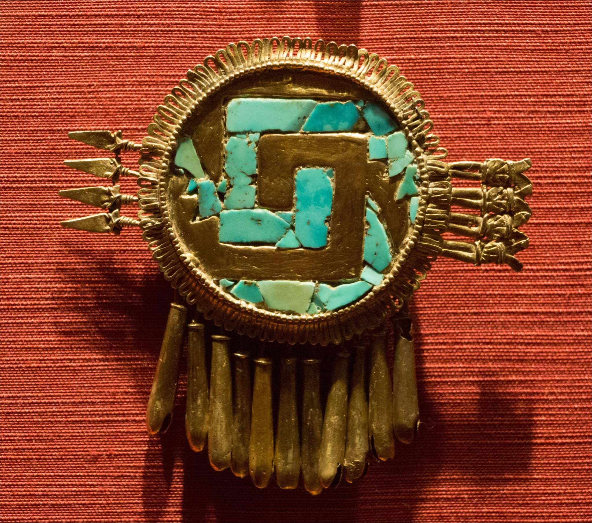 Pieza de orfebrería mixteca realizada en oro con incrustaciones de turquesa. Procede de Yanhuitlán (México). Cultura mixteca, período Posclásico (ss. X-XVI). Colección del MNA de la ciudad de México.